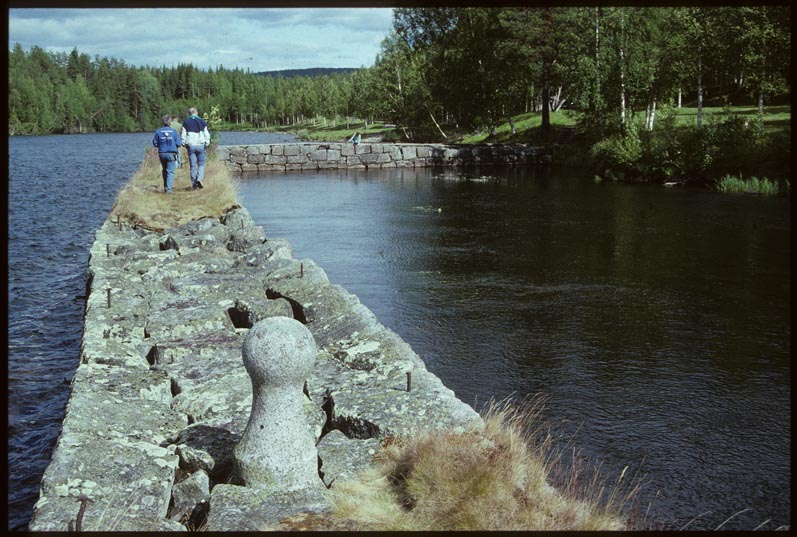 Edefors 24:3. Engelska kanalen, ursprungligen ca 2 km lång. Motiv: Edefors 24:3 Kategori: kanal Edefors 24:3. Engelska kanalen, ursprungligen ca 2 km lång. Edefors 24:3.